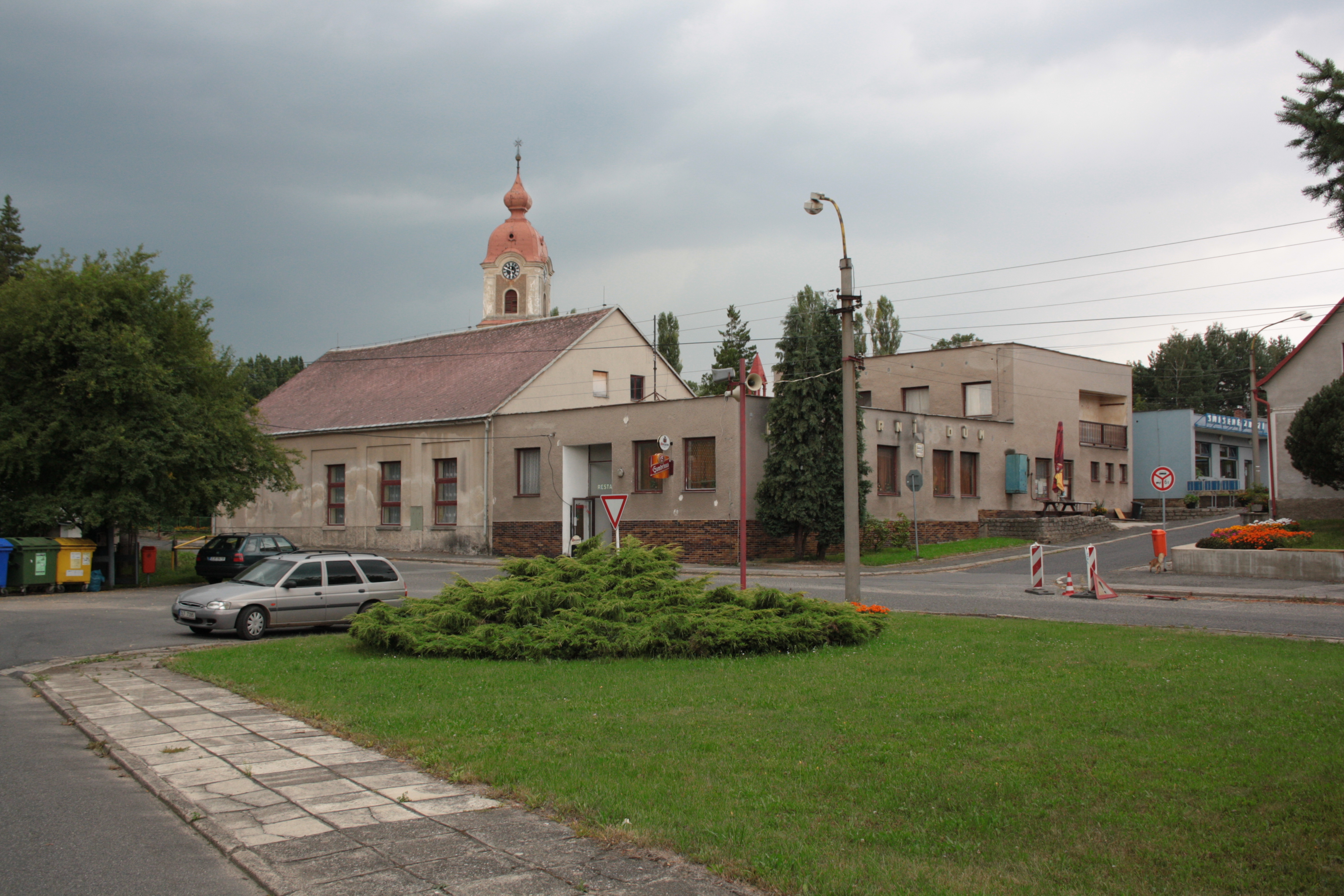 This photograph was taken with a DSLR from WMCZ's Camera grant. Kulturní dům v Kunraticích poblíž Frýdlantu v okrese Liberec.